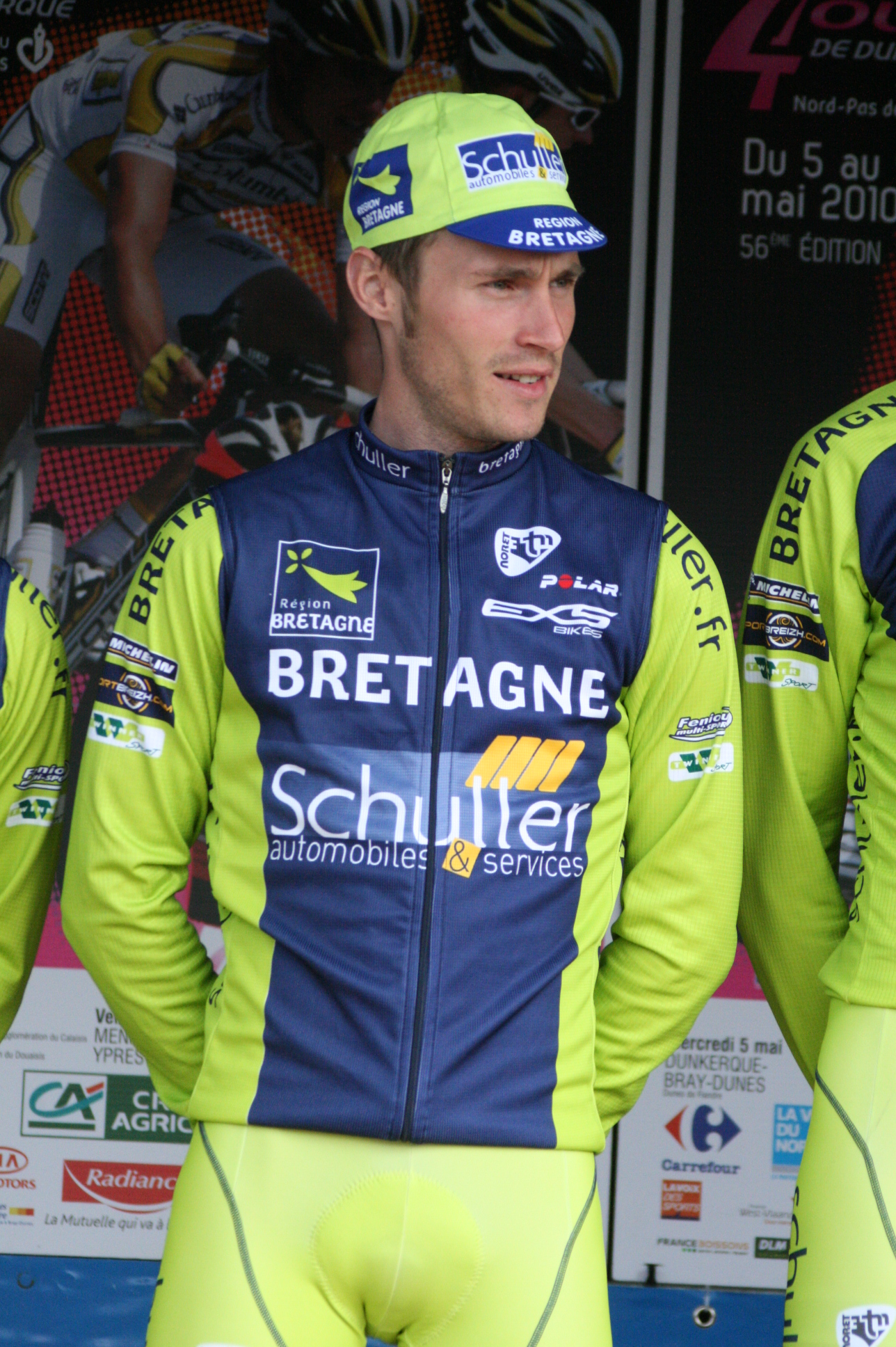 Florian Vachon, lors de la présentation des équipes des 4 jours de Dunkerque 2010